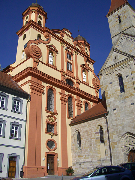 Blick auf die evangelische Stadtkirche (ehem. Jesuitenkirche) von Ellwangen (Jagst)